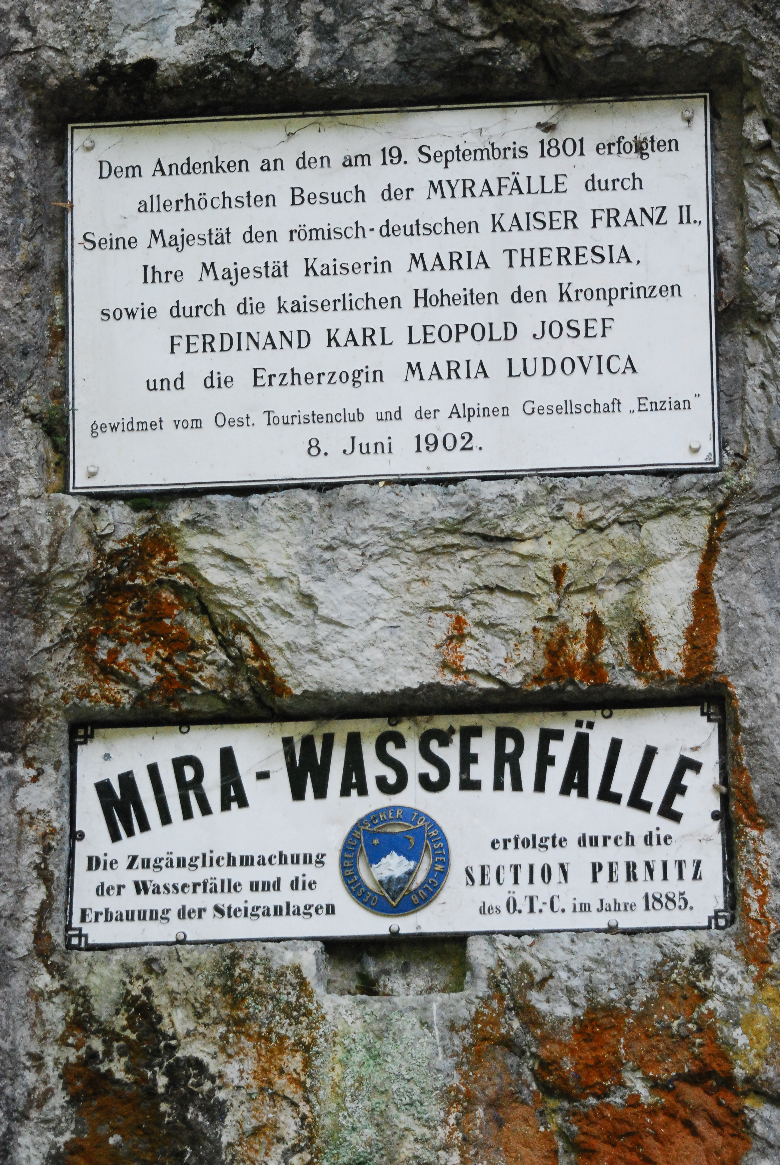 Zwei Gedenktafeln am unteren Ende der Myrafälle (Mirafälle) in Muggendorf (Niederösterreich).